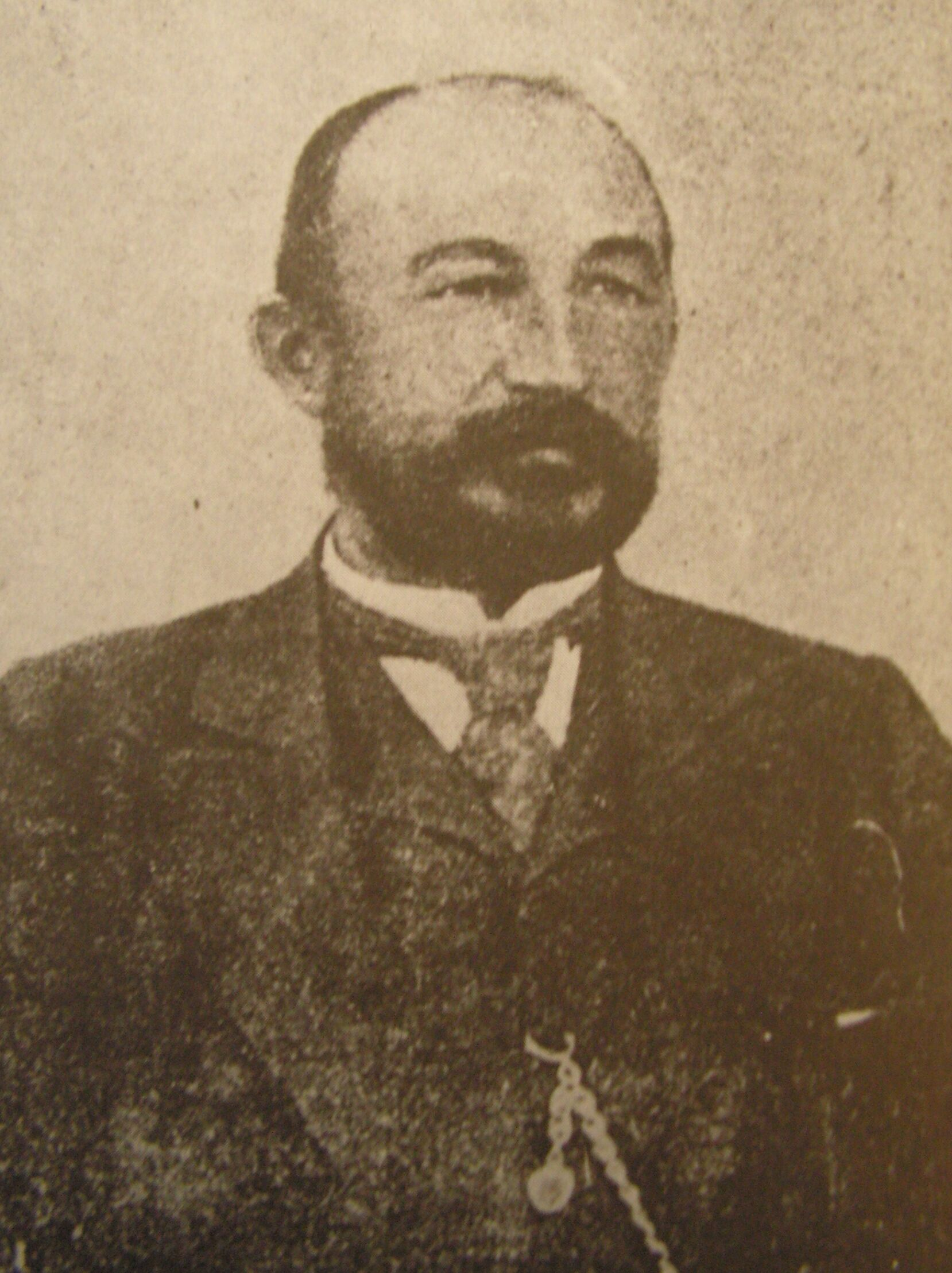 Wéber Ede